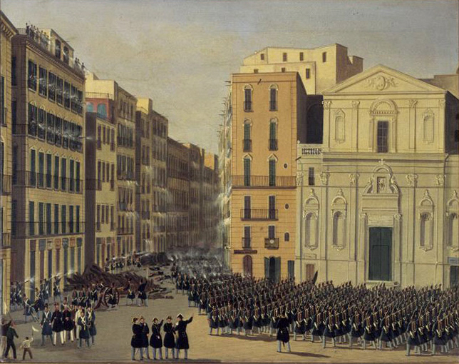 Strassenkampf des 4. Schweizerregiments in Neapel, 15. Mai 1848. Links Angriff auf die Barrikade am Anfang der Via Toledo (heute Via Roma). Rechts die Fassade der Kirche San Ferdinando. Öl auf Leinwand; 50.3 x 63.6 cm Schweizerisches Nationalmuseum, Zürich, LM-3525